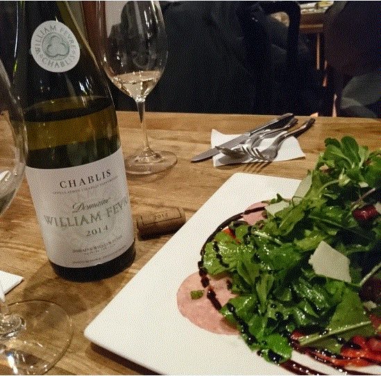 100% 샤르도네로 만들어진 샤블리와인